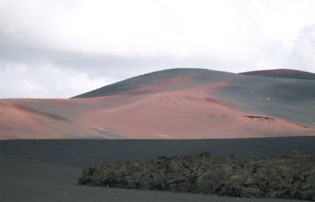 La Payunia